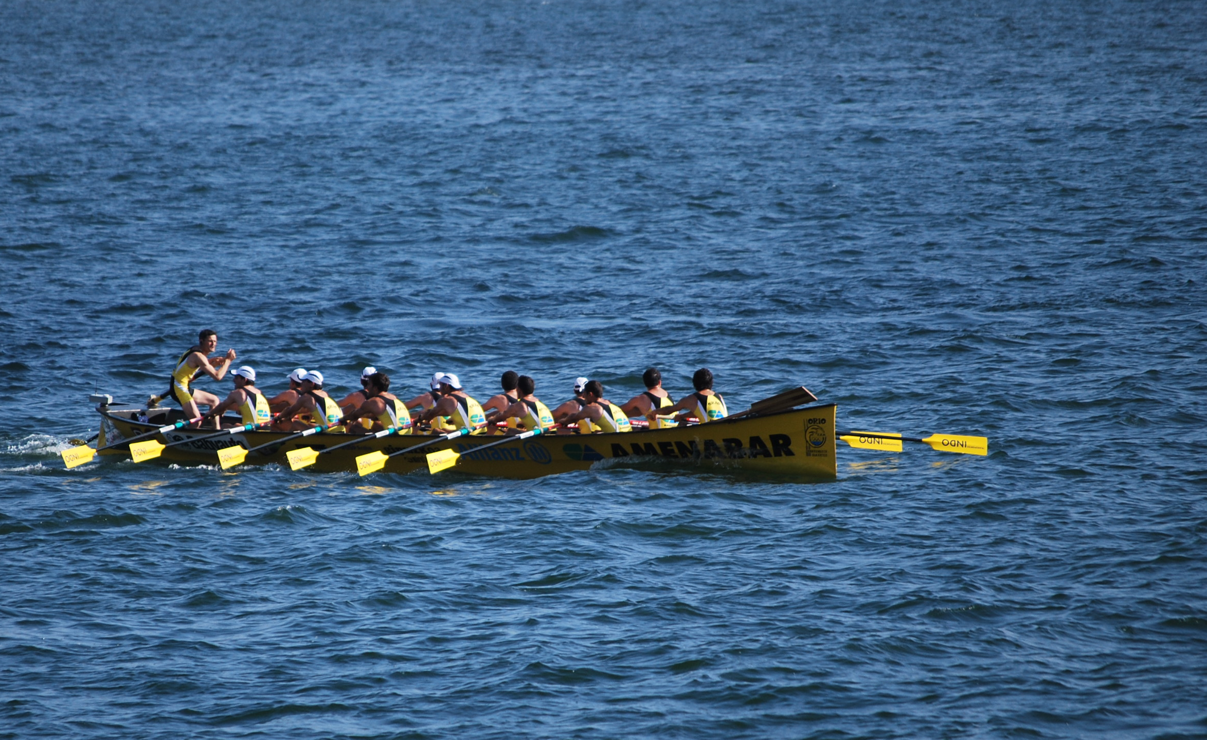 Départ de la première manche à Getxo (Biscaye).